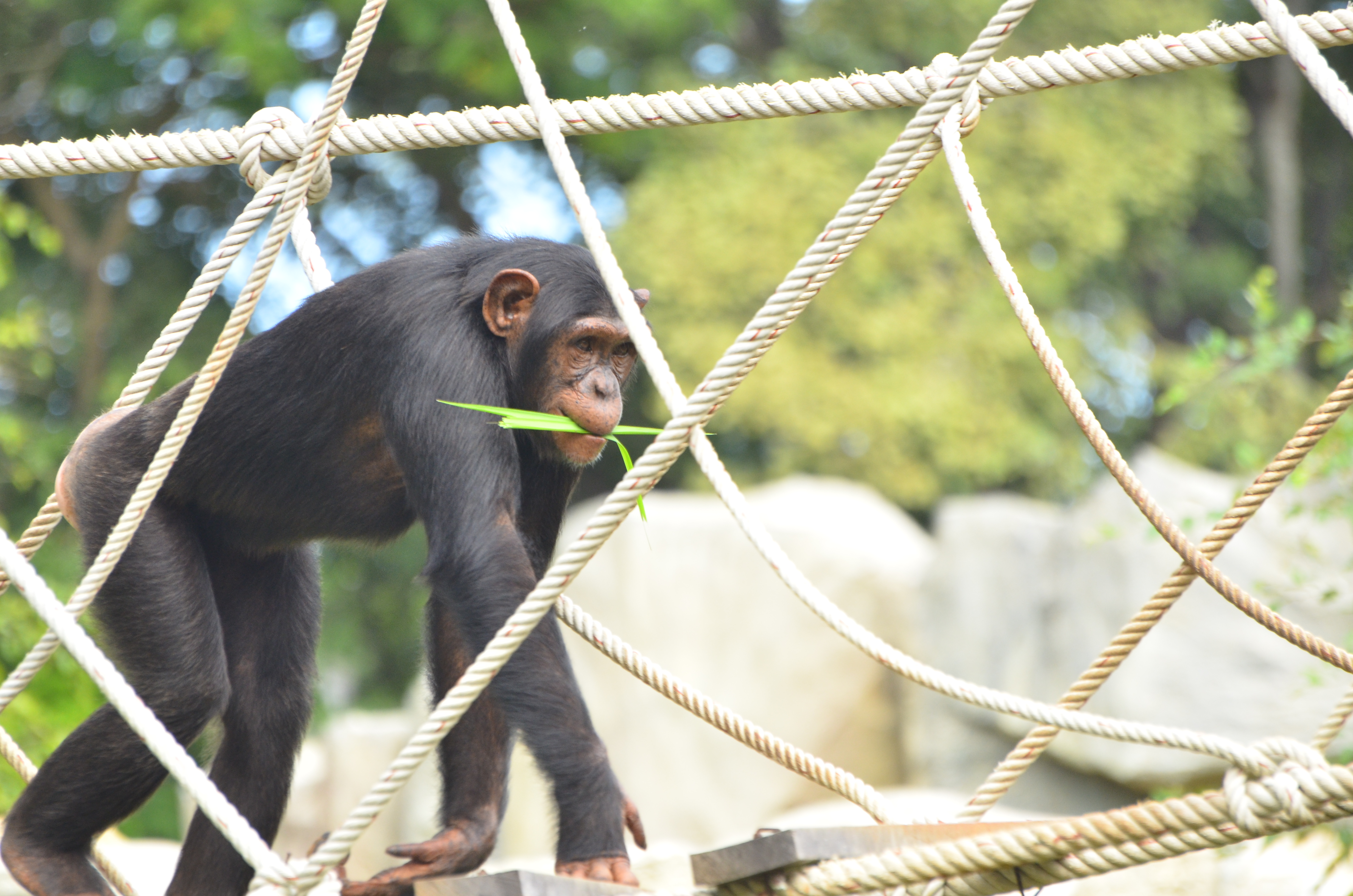 Chimpanzee on the rope bridge